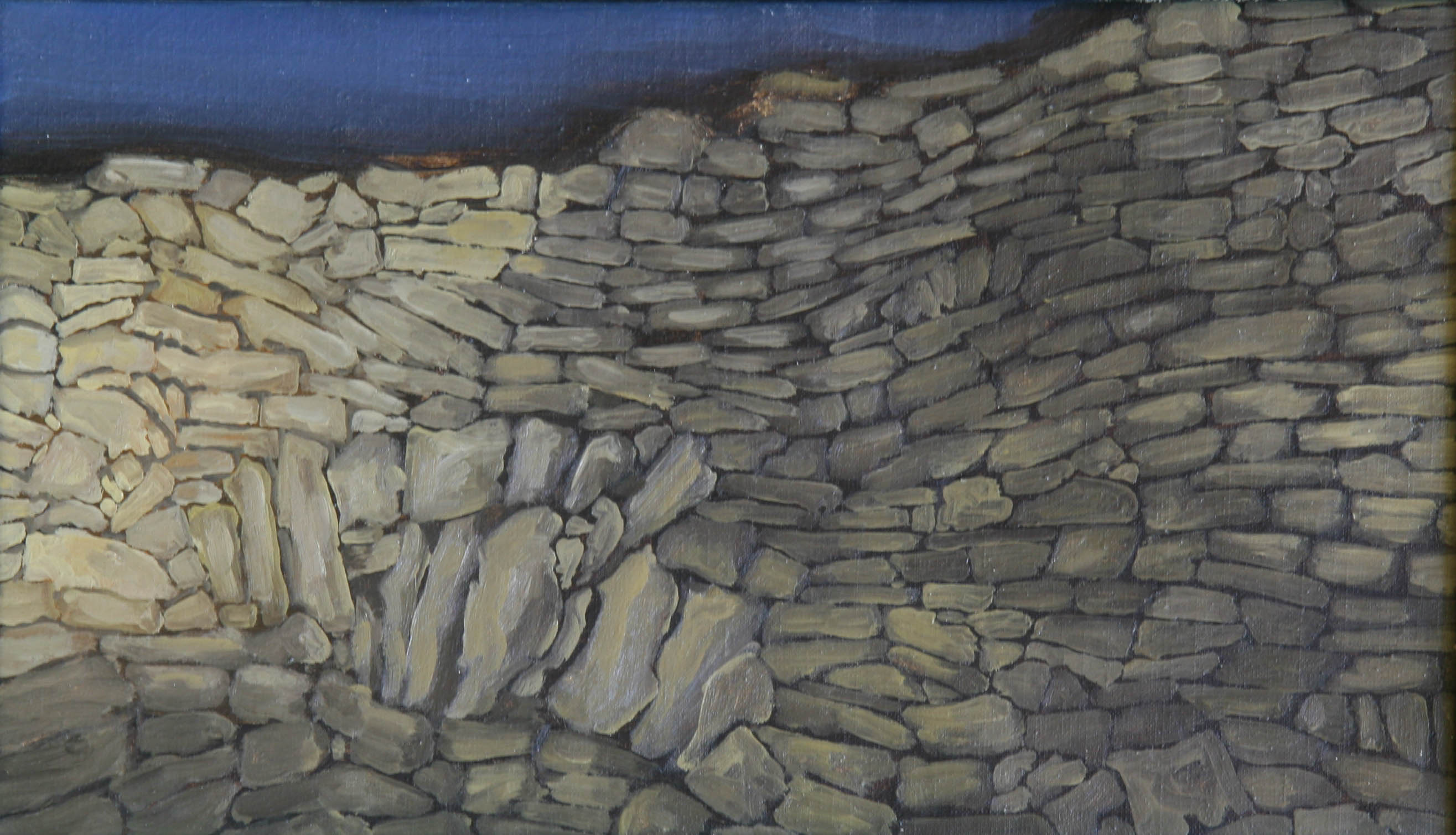 peinture - Mur, huile sur toile 27 × 41 cm, 1970